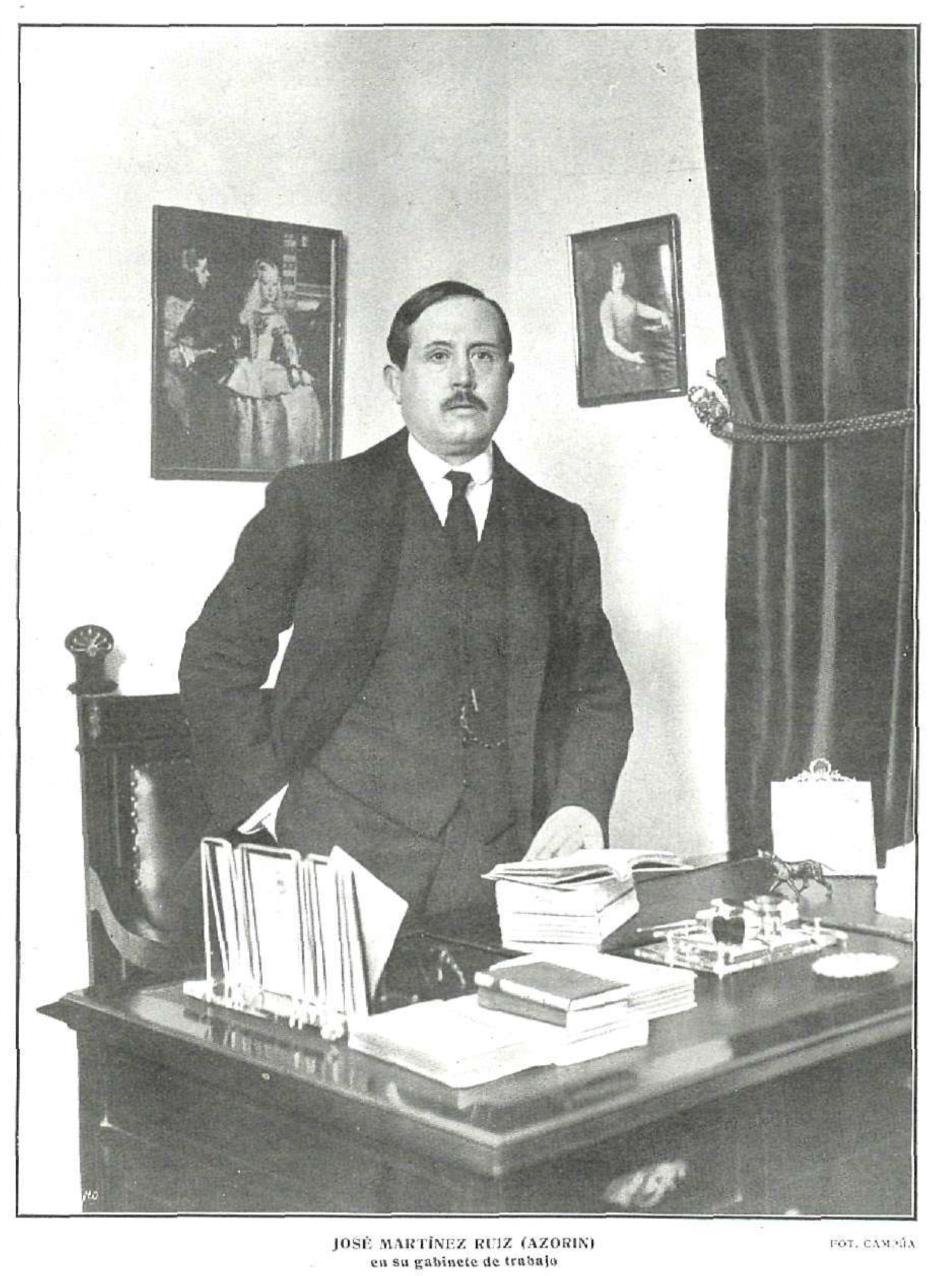 Azorín en su gabinete de trabajo.